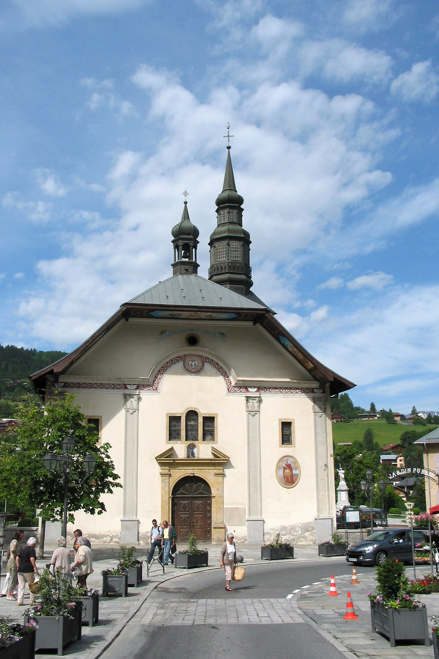 Saint-Gervais-les-Bains (Haute-Savoie - France), l'église Saint-Gervais et Protais (construite en 1698 à l'exception de sa tour du XIIème siècle et de son clocher reconstruit en 1819).